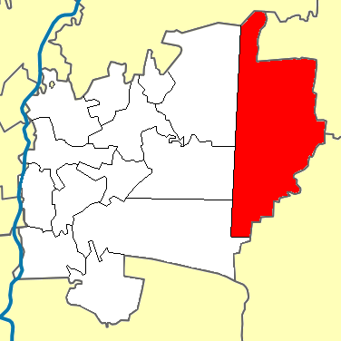 Кулгунінська сільська рада